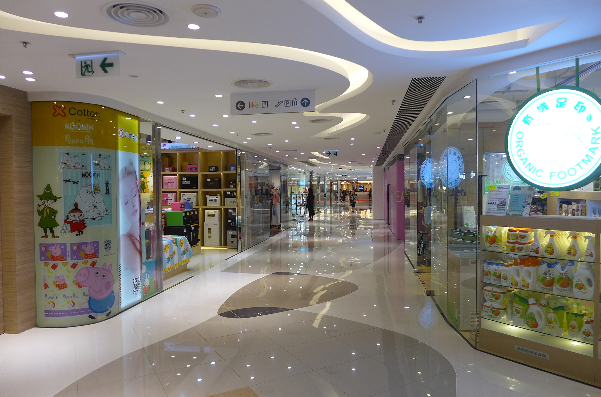 Green Code Plaza Level 1 Shops